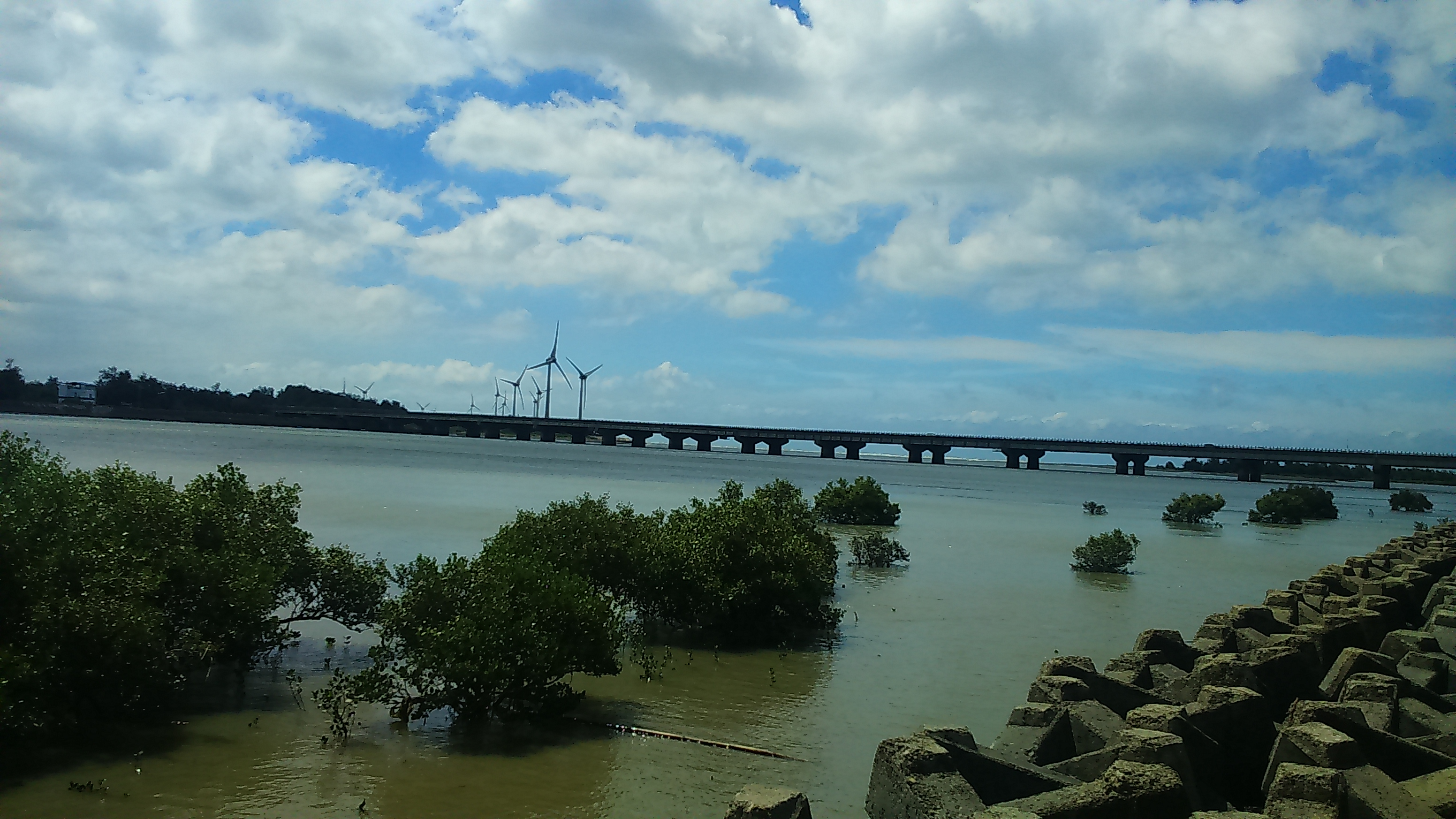 中港溪出海口(滿潮退潮中)